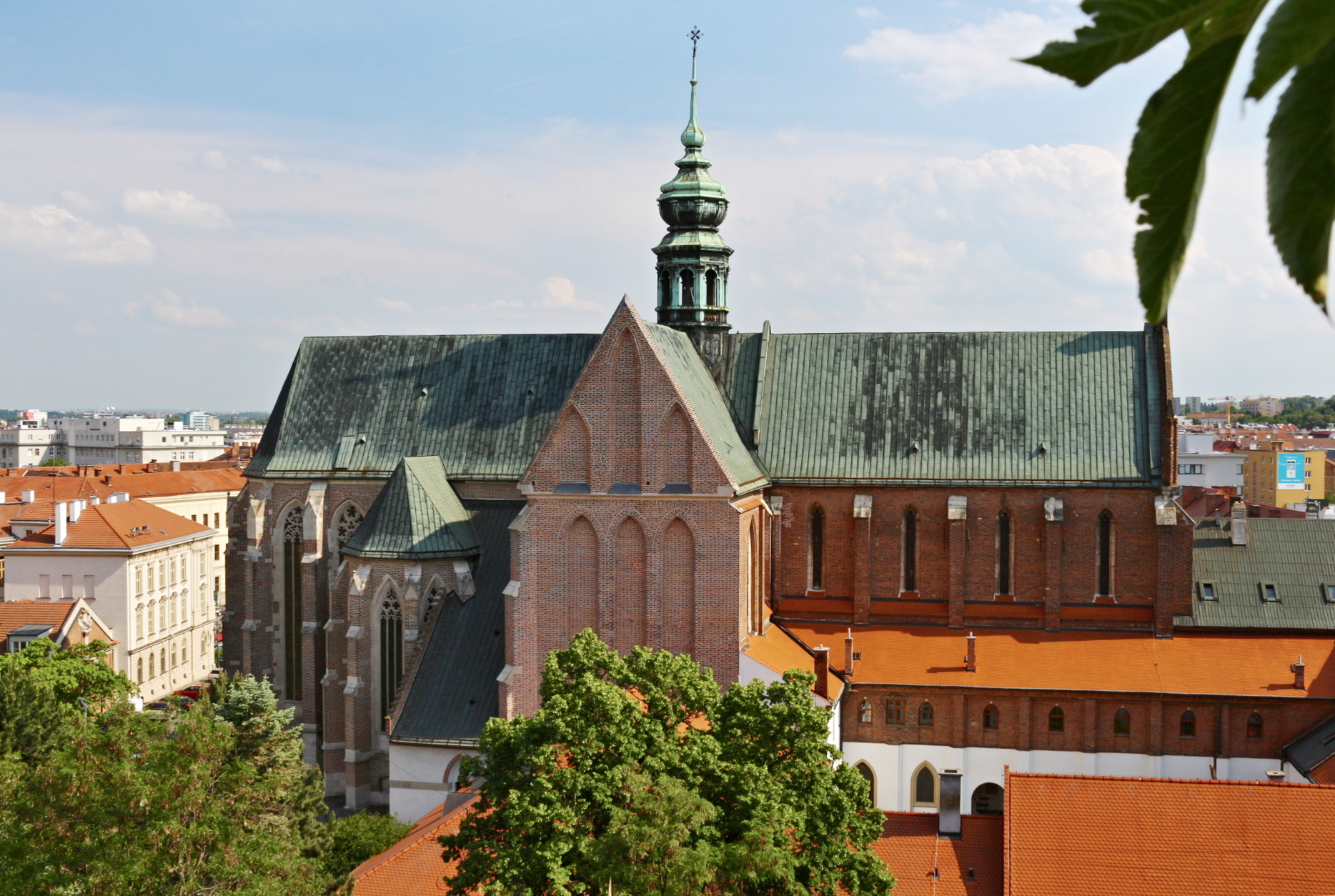 Bazilika Nanebevzetí Panny Marie (Brno)